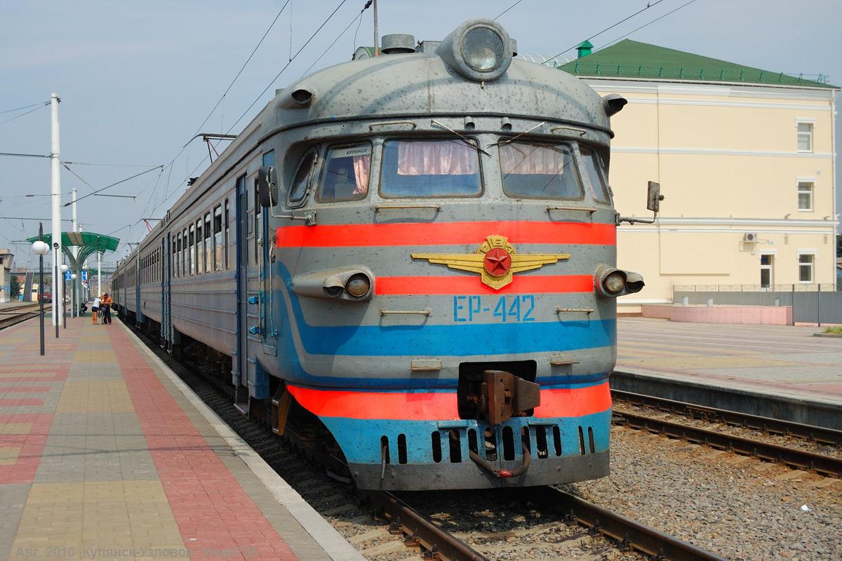 Электропоезд ЭР9П с дополнительным головным вагоном ЭР9П-442, ст. Купянск-Узловой, Харьковская область.